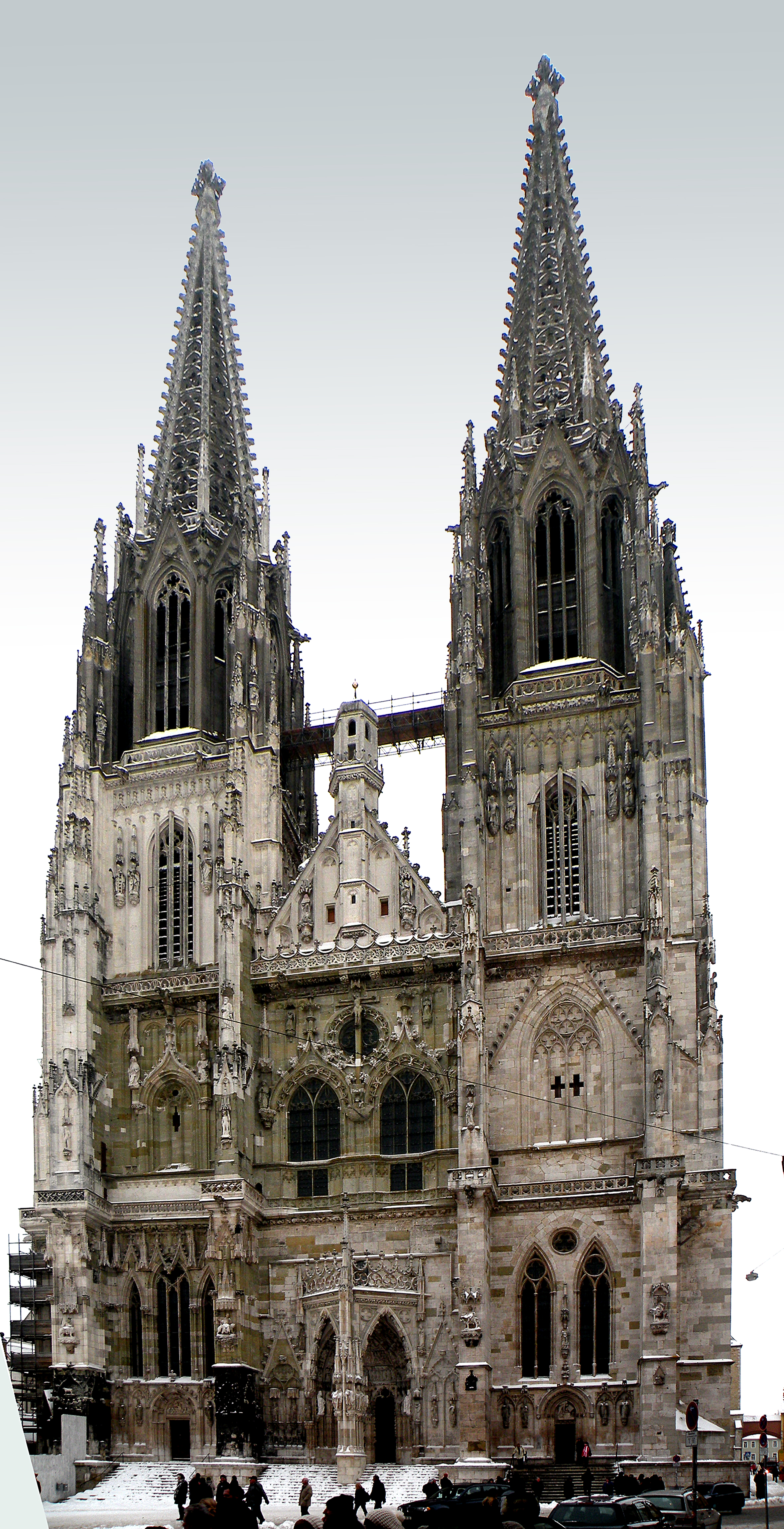 Регенсбург.Собор.Св.Петра